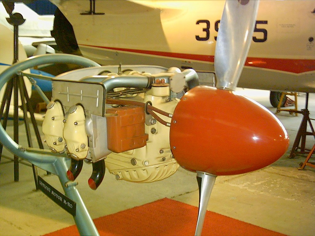 Walter M-110, Kbely museum, Prague, Czech Republic